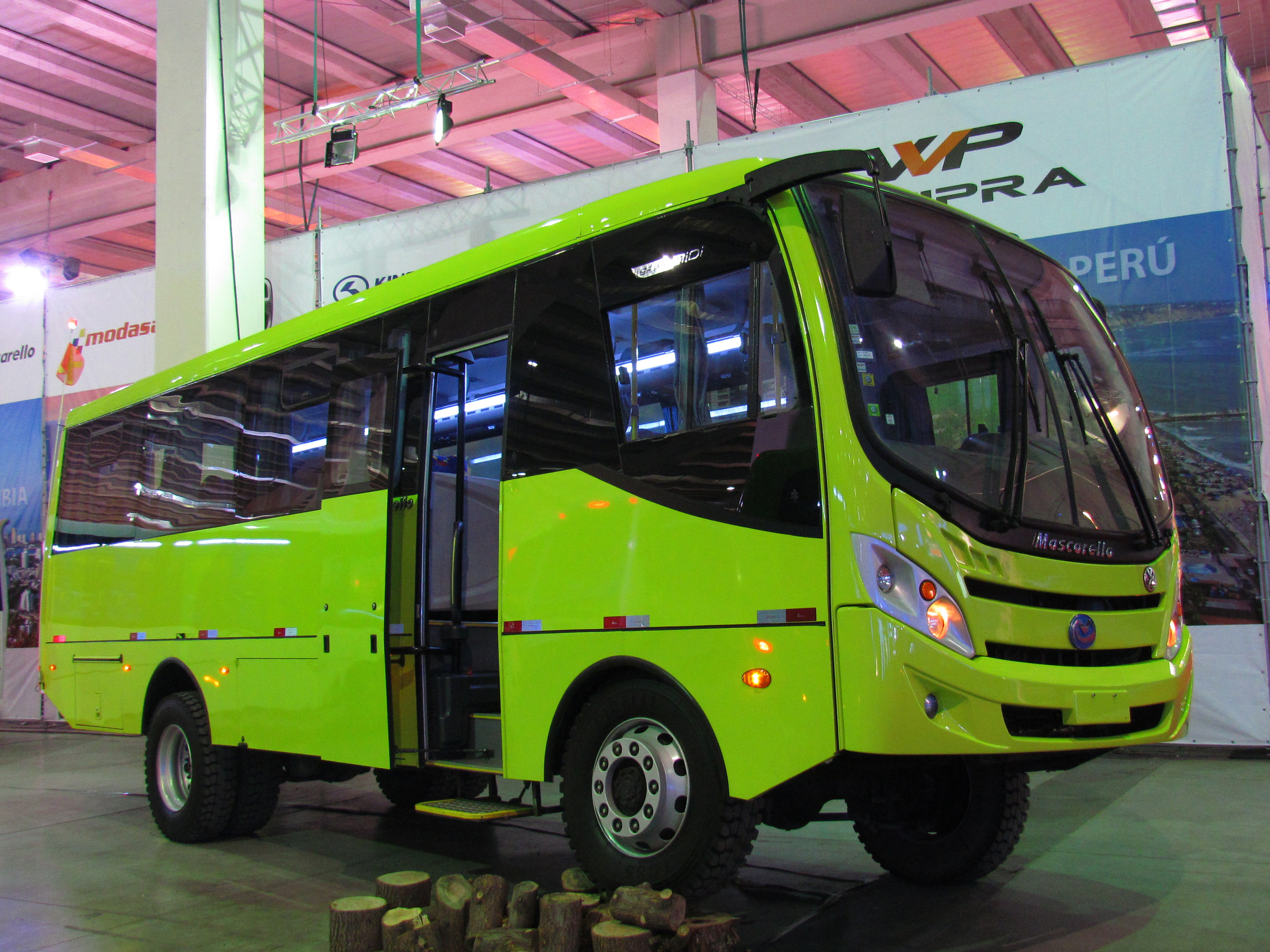 VW Volksbus 15-190